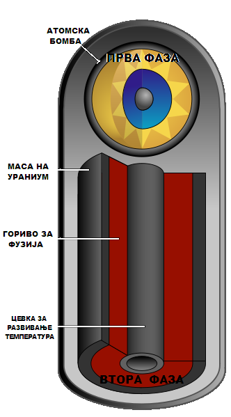 Внатрешен изглед на Термонуклеарна или Хидрогенска бомба.